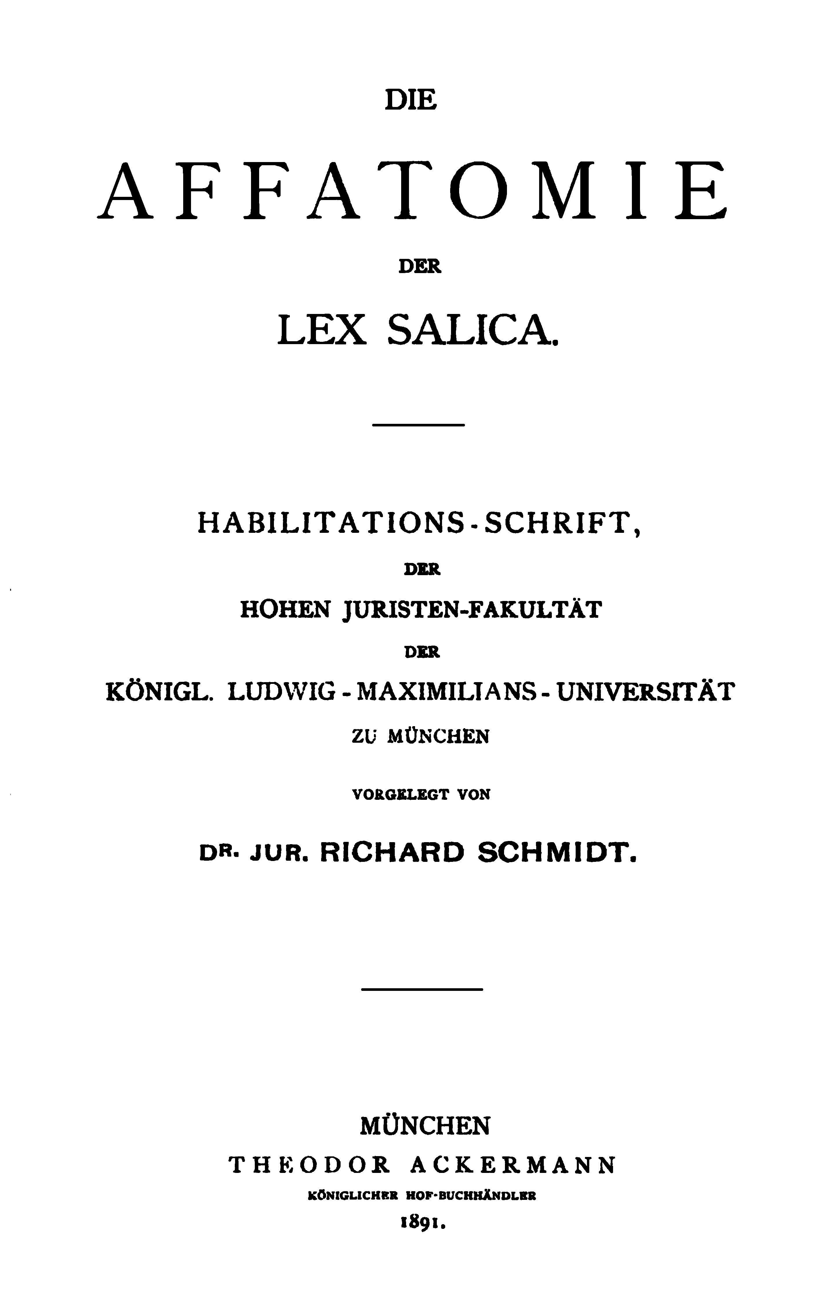 «Die Affatomie der Lex Salica» von Richard Schmidt